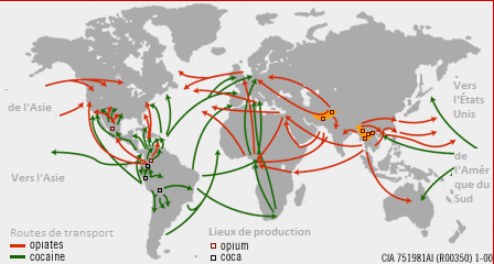 Drogen Herkunft und Transport